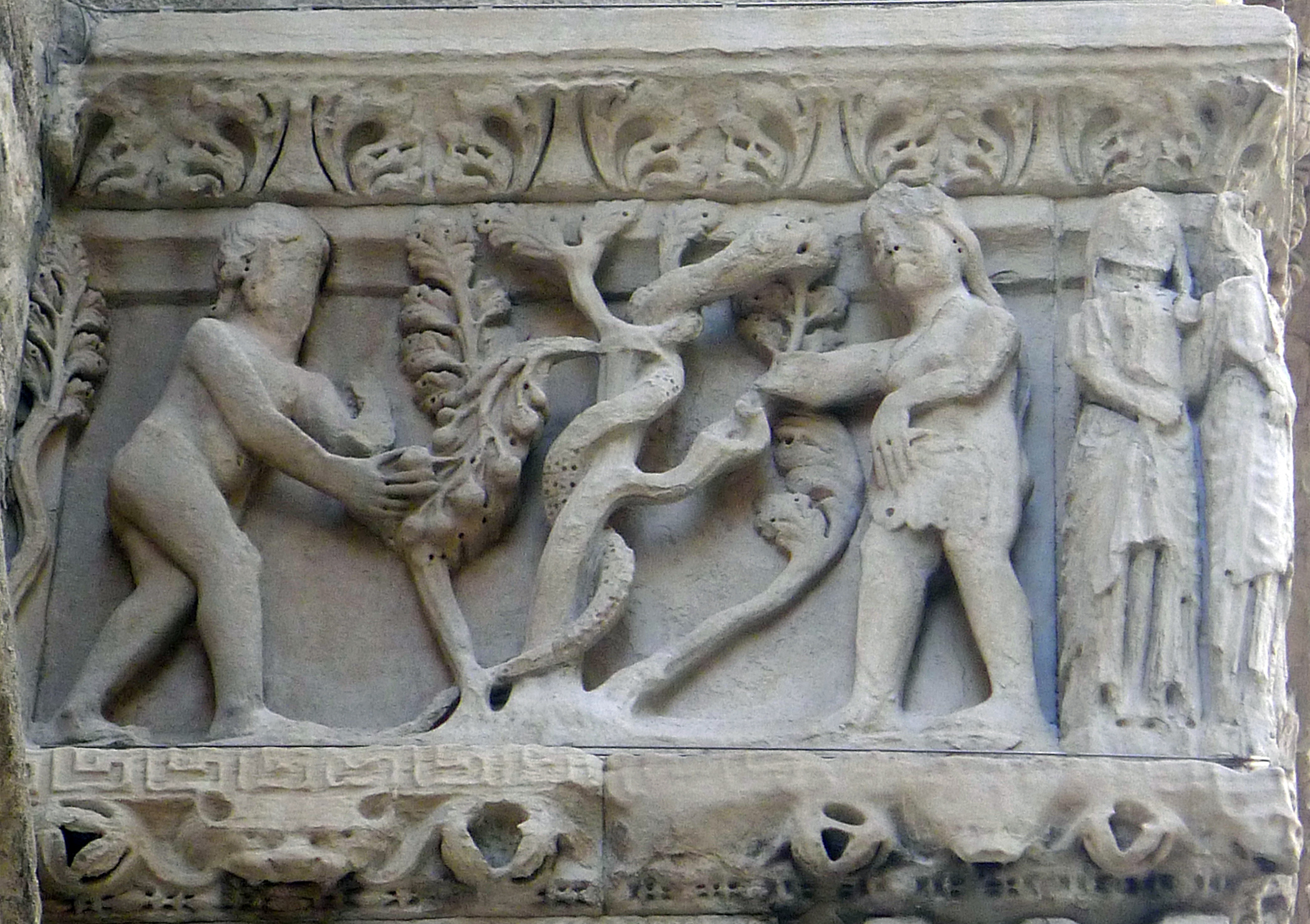 Église Saint-Trophime (scène biblique du portail : Adam et Eve au Paradis, tentés par le Démon) - Arles, France